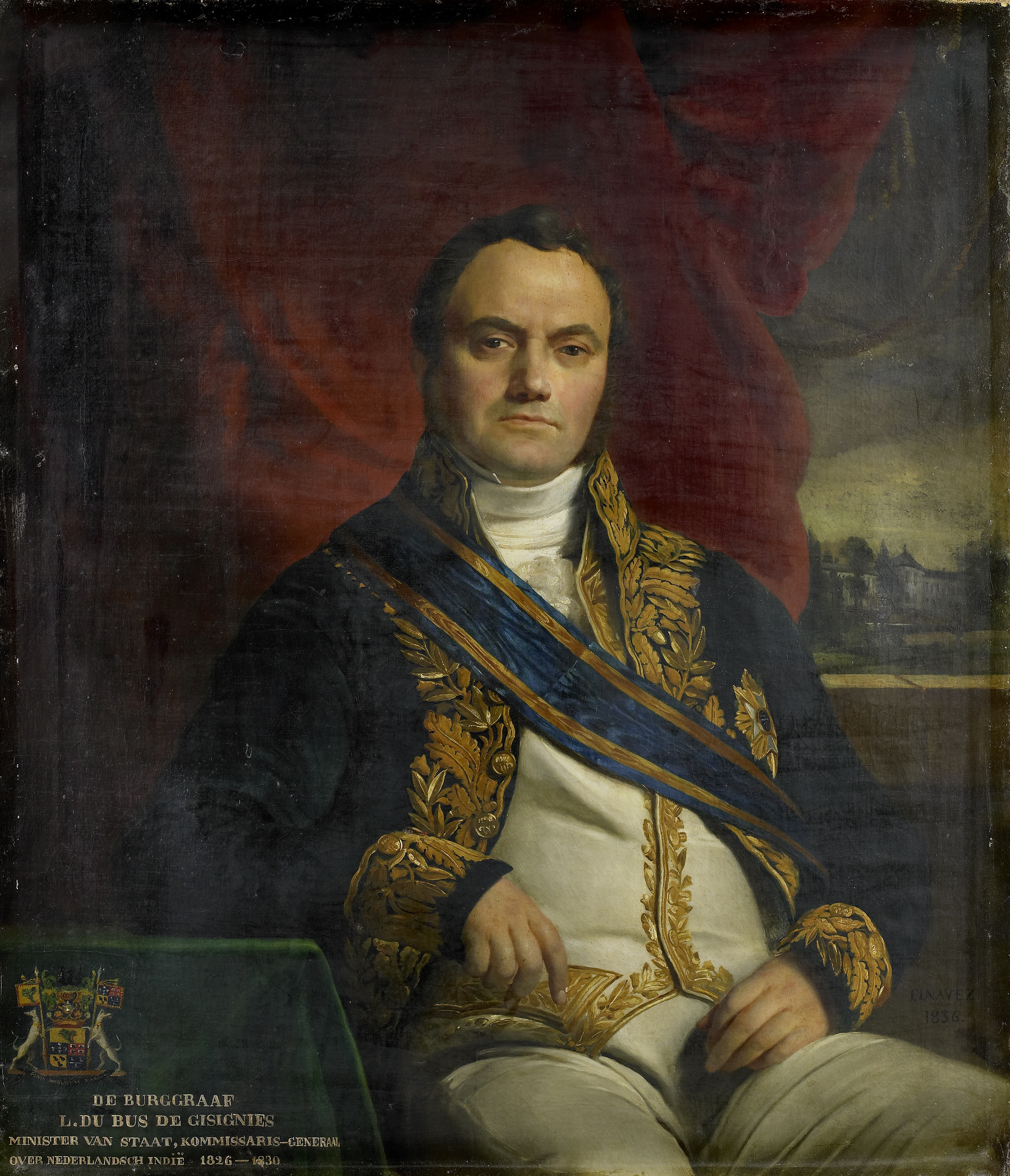 Portret van Léonard Pierre Joseph Burgrave du Bus de Gisignies (1780-1849). Commissaris-generaal (1826-30). Kniestuk, zittend in een stoel, iets naar rechts, met de rechterarm geleund op een tafel. Over de balustrade rechts op de achtergrond een landschap met een landhuis. Onderdeel van een reeks van portretten van de gouverneurs-generaal van het voormalige Nederlands Oost-Indië. Collection: schilderijen; Gouverneurs-generaal serie